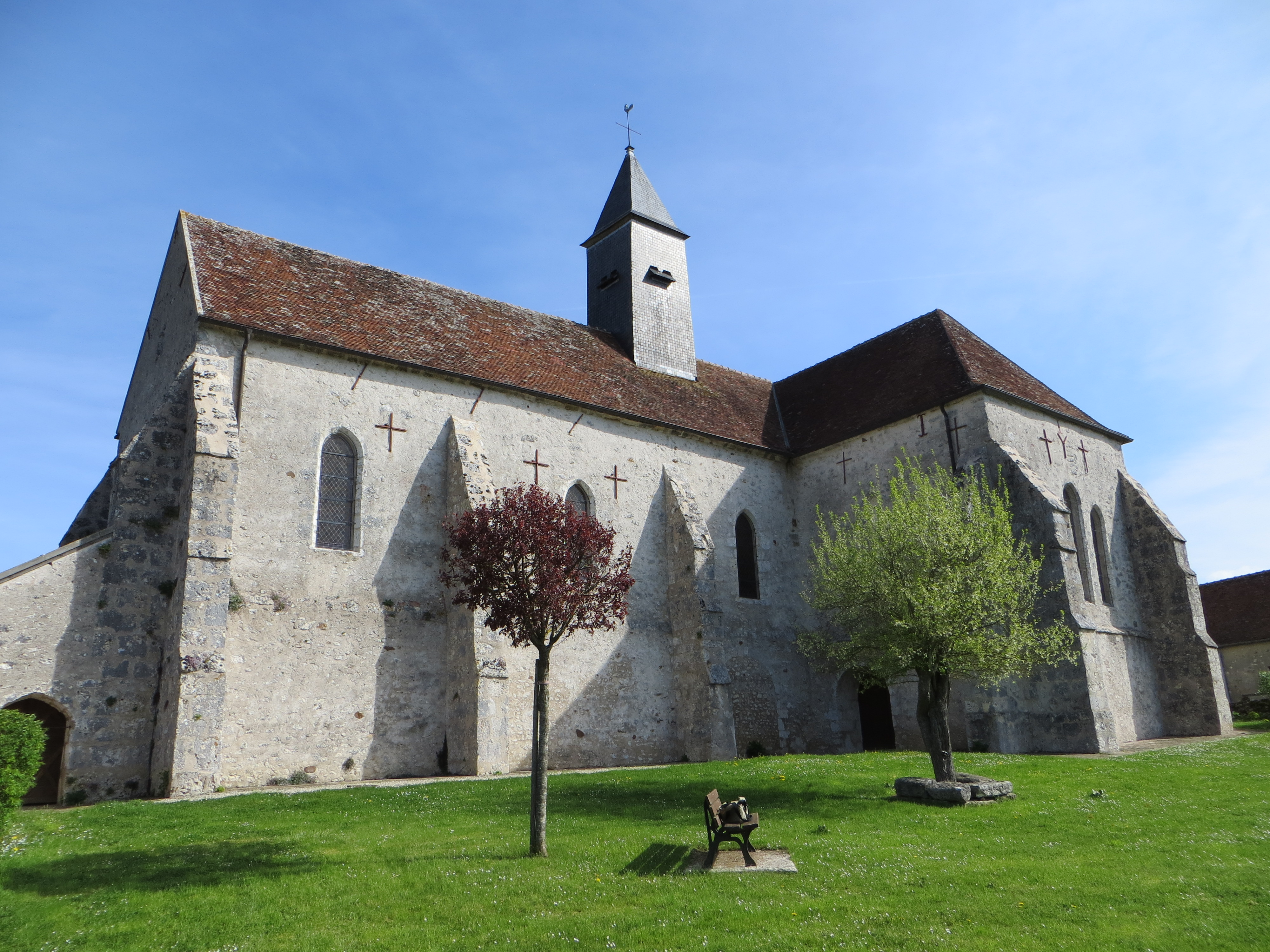 Vue générale de l'église